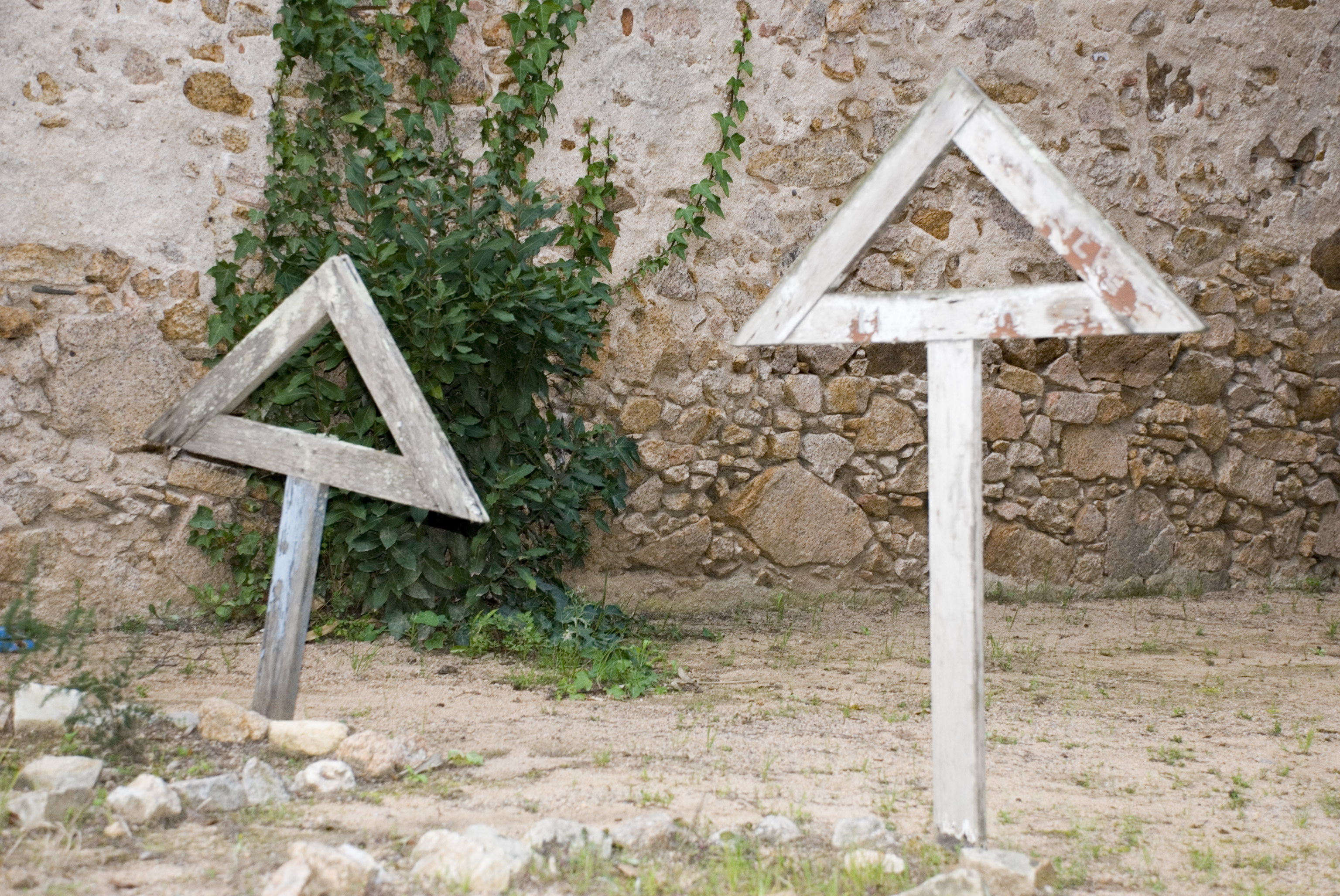 Anonymous masonic tombs in Sant Feliu de Guíxols' graveyard Camera data Camera Nikon D80 Lens Nikon AF-S DX 18-135 mm Focal length 48 mm Aperture f/4.8 Exposure time 80 s Sensivity ISO 100